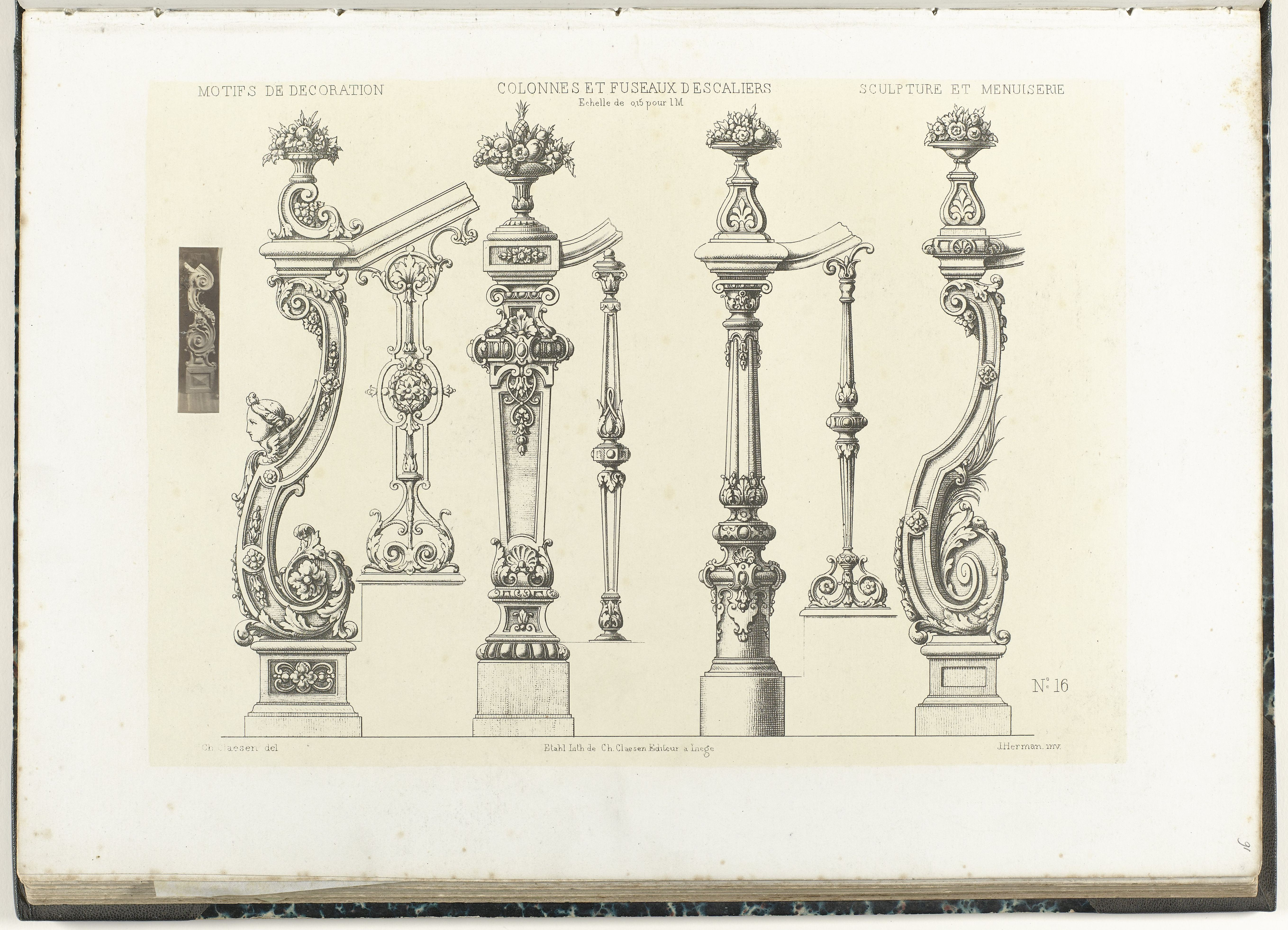 IdentificatieTitel(s): Acht balustersColonnes et fuseaux d escaliers (titel op object)Objecttype: prent Objectnummer: RP-D-1996-1-91Omschrijving: Zuilen en spijlen van trappen. Links is een kleine uitgeknipte foto geplakt van een baluster in de vorm van twee voluten. Linksboven staat vermeld: Motifs de decoration, rechtsboven: Sculptures et menuiserie, rechtsonder: N° 16VervaardigingVervaardiger: prentmaker: Charles Claesen (vermeld op object)naar ontwerp van: J. Herman (vermeld op object)uitgever: Etablissement Lithographique De Charles Claesen (vermeld op object)fotograaf: anoniemPlaats vervaardiging: Luik (mogelijk)Datering: ca. 1866 - ca. 1900Materiaal: papier Techniek: toonlithografie / albuminedrukAfmetingen: blad: h 418 mm × b 290 mmVerwerving en rechtenVerwerving: aankoop 1996Copyright: Publiek domein